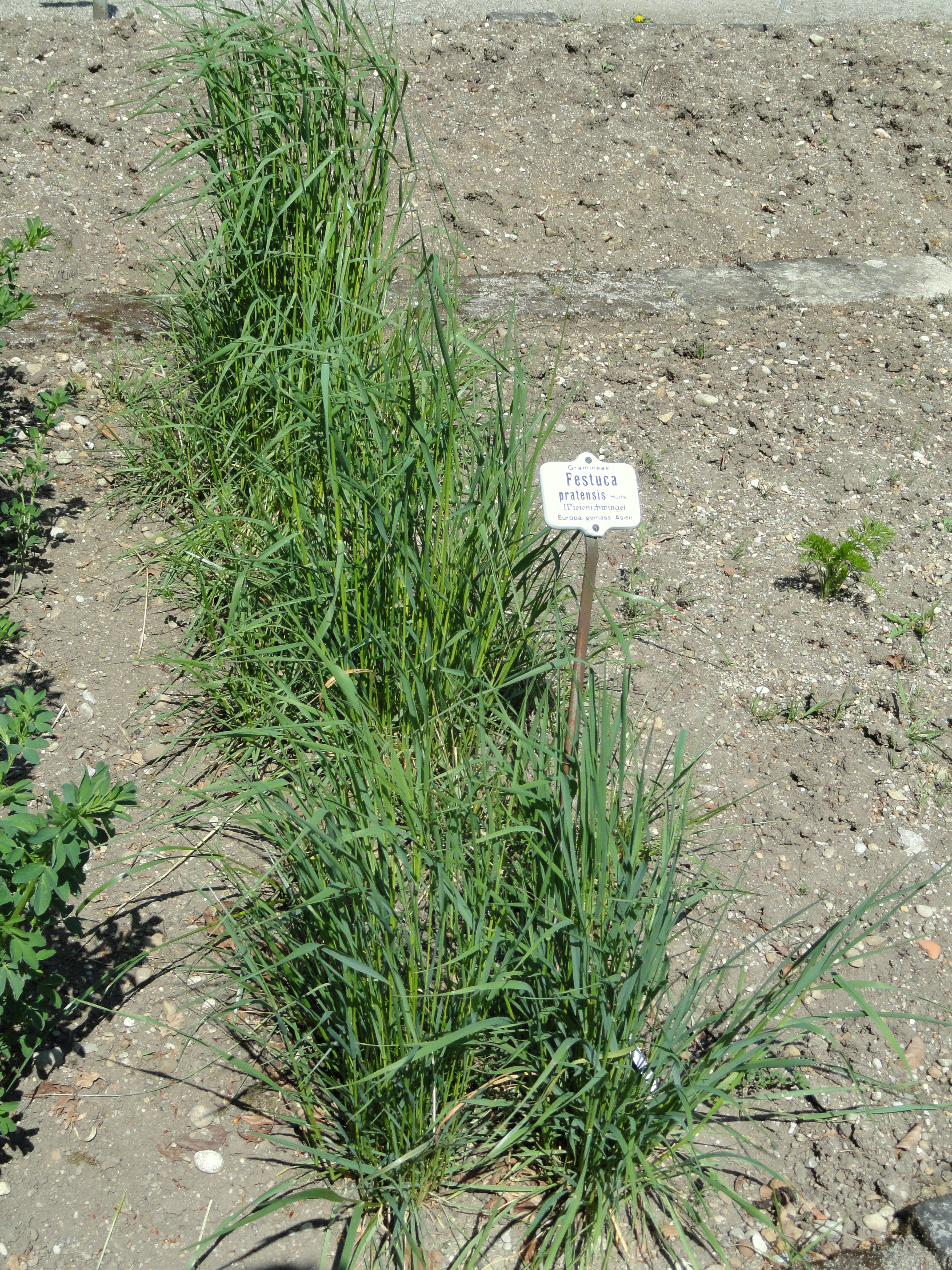 Festuca pratensis specimen in the Botanischer Garten München-Nymphenburg, Munich, Germany.